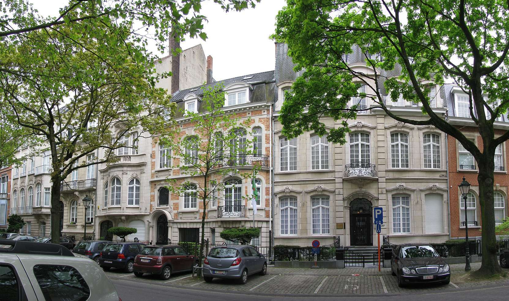 Ixelles, av. Molière 207, Hôtel particulier par Paul Picquet en 1910 et autres maisons de maître